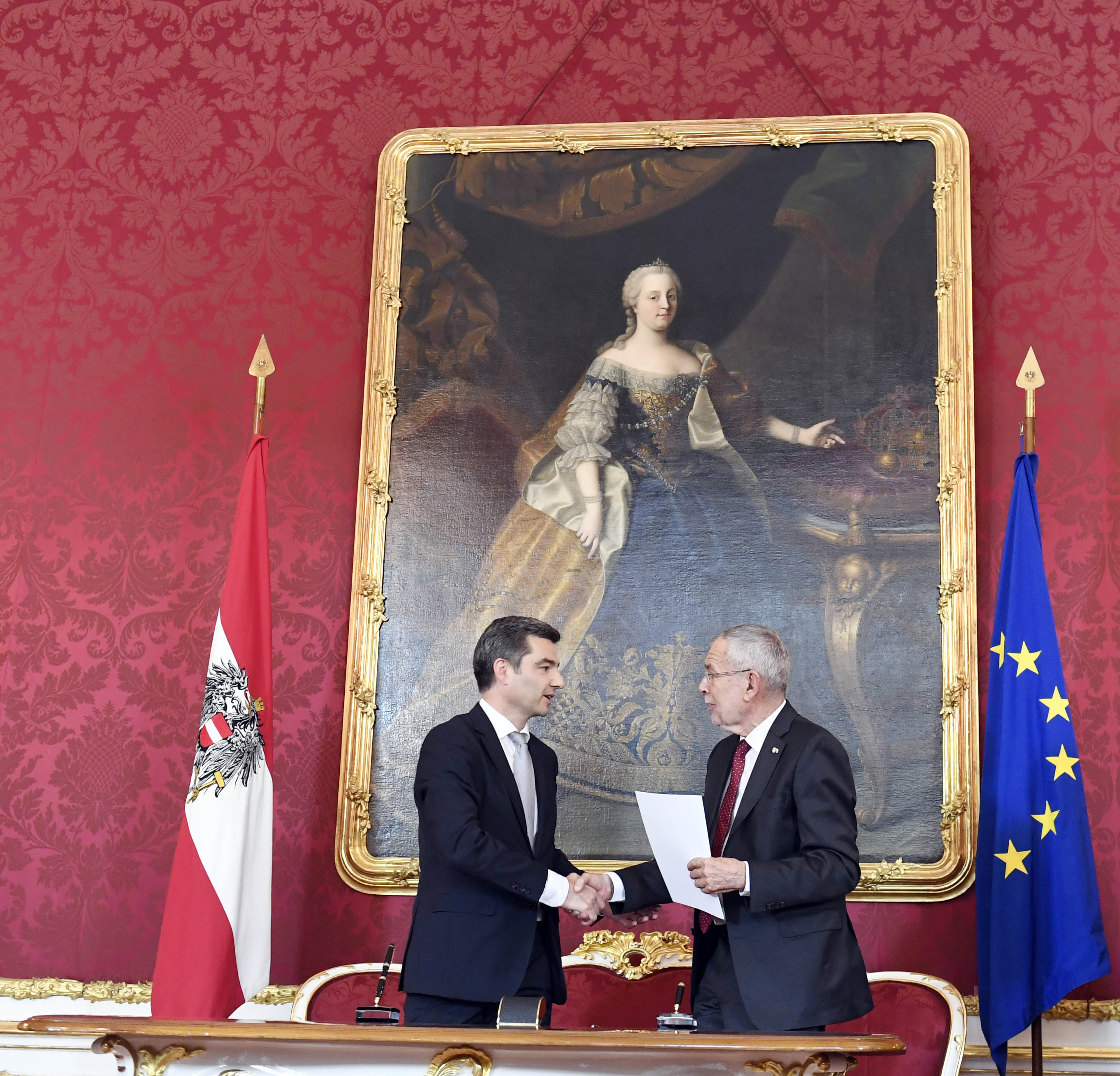 Am 3. Juni 2019 wurde Mag. Alexander Schallenberg als Bundesminister für Europa, Integration und Äußeres angelobt. Foto: Mahmoud